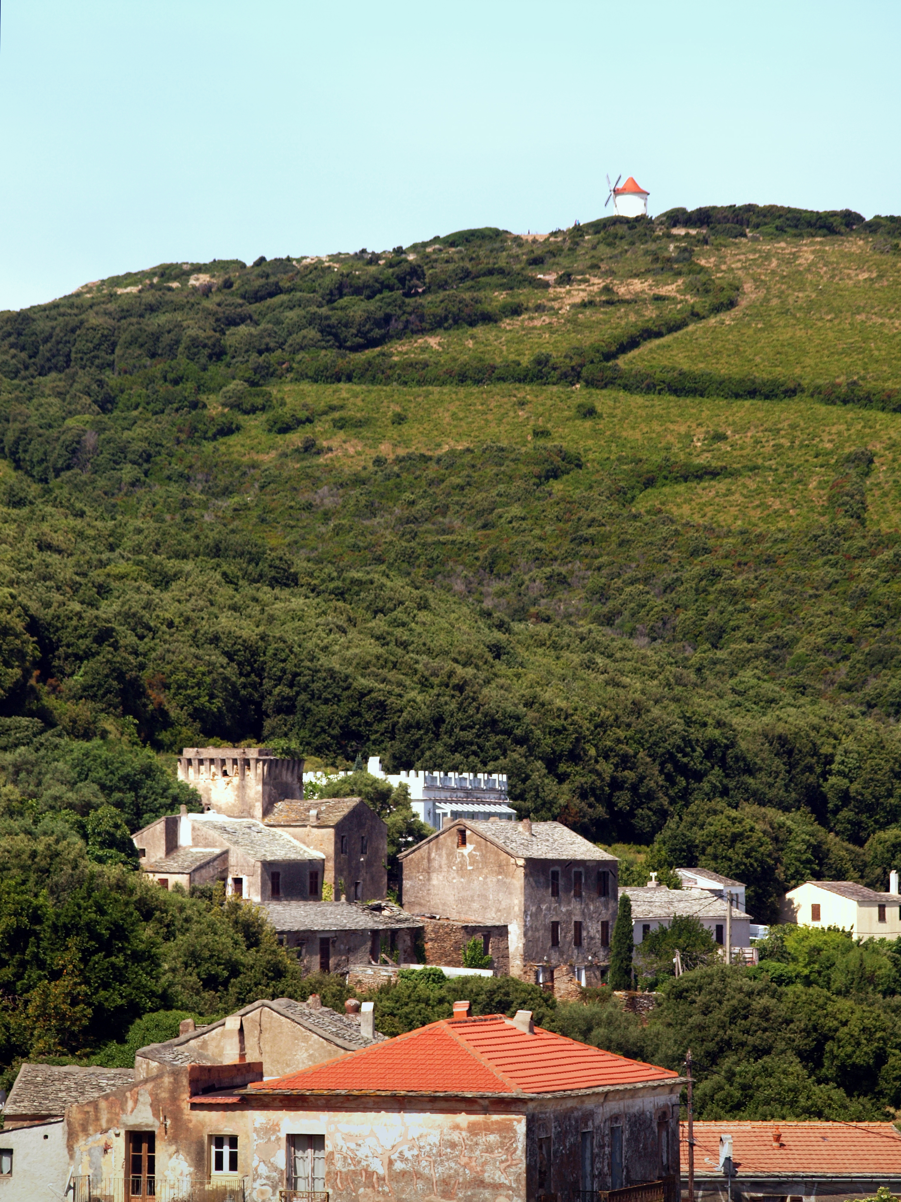 Ersa (Corse) - Hameau de Gualdo. Sur la crête, le Moulin Mattei